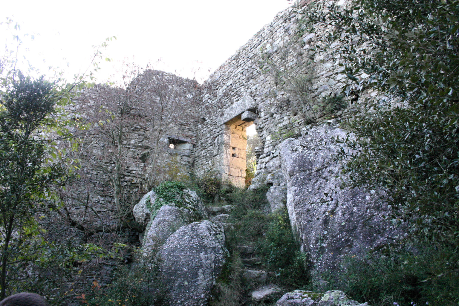 Rocca della Verruca (Verruca castle) enter